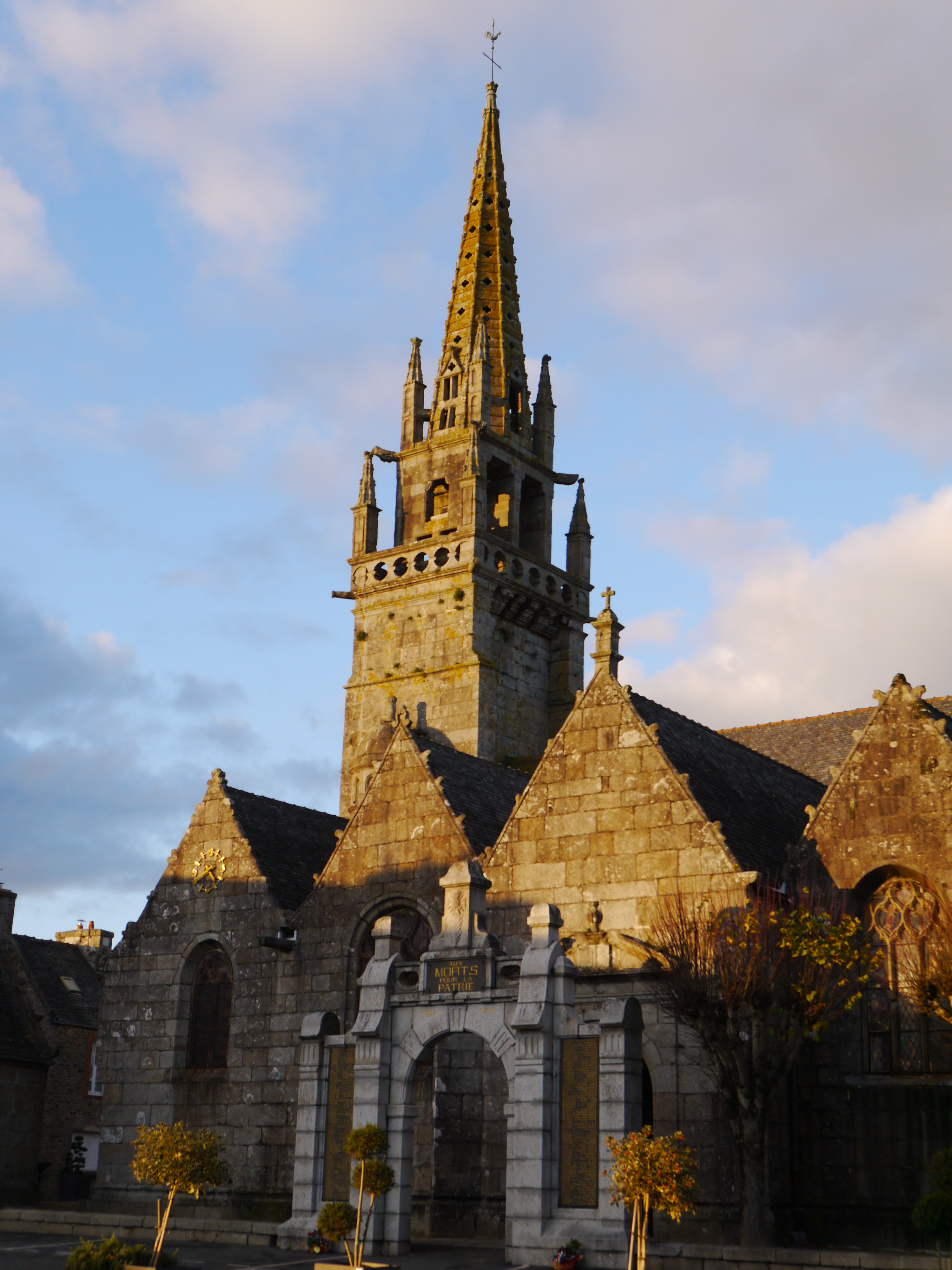 Eglise Saint-Pierre : vue du sud